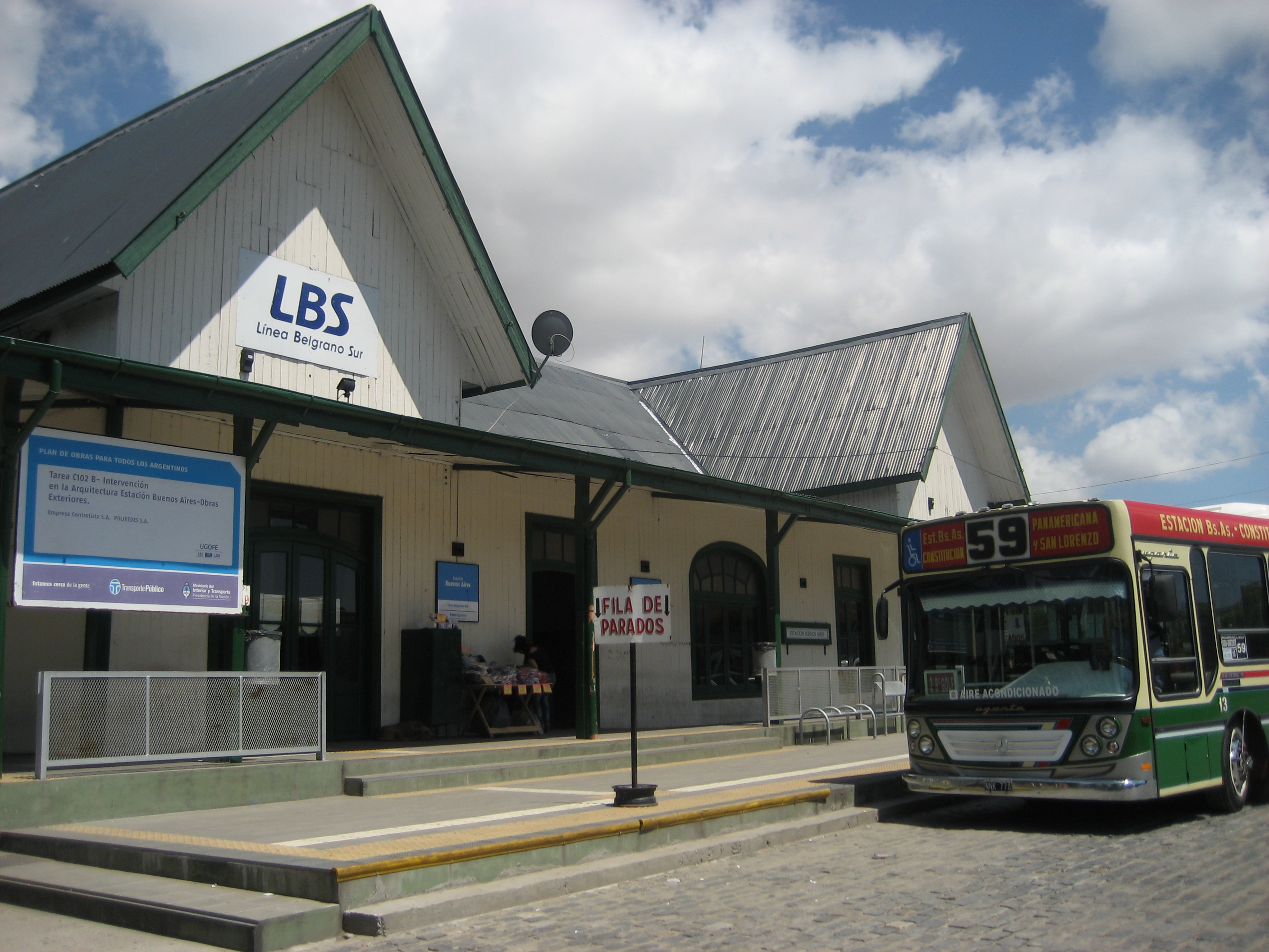 Frente de la Estación Buenos Aires, terminal de la línea Belgrano Sur, con colectivo 59